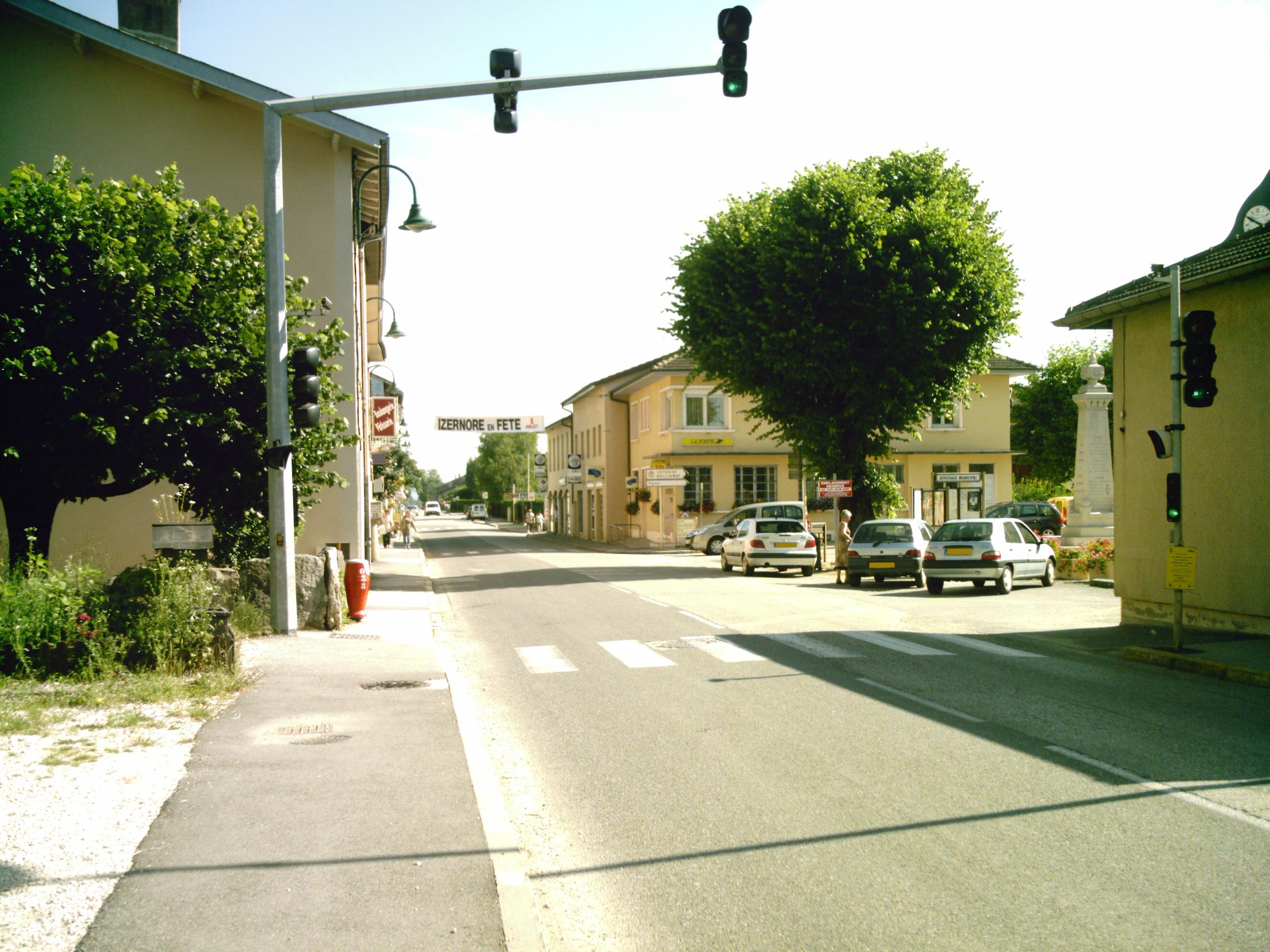 Rue principale d'Izernore (Ain, FRANCE). Grande rue.